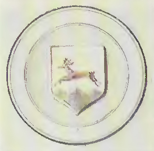 Беларуская (тарашкевіца): Горадня (Horadnia). Герб места